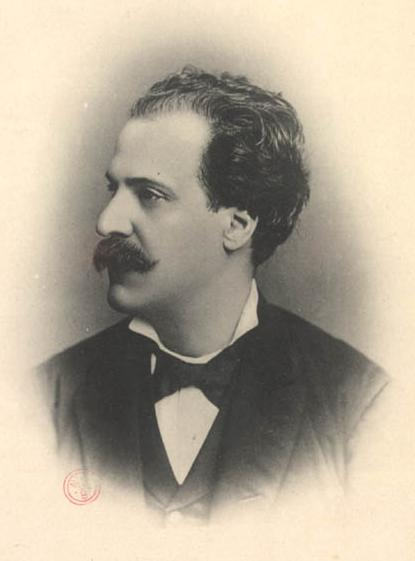 Photographie du géographe Luciano Cordeiro.